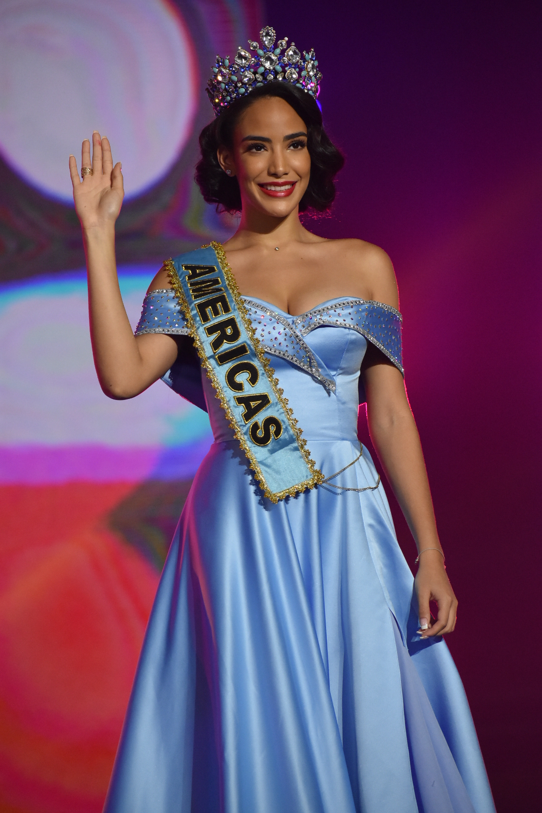 Despedida homenajeada de Solaris Barba Miss World Americas 2018